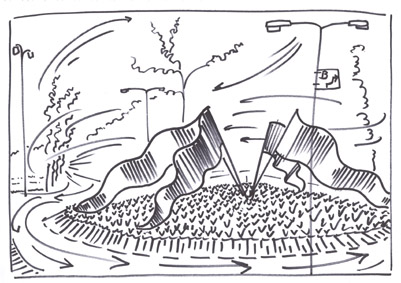 2005 - 2006 Kreeg Ineke Visser de 0pdracht voor een rotonde in Hengelo. Staal. 4 Wimpels van 6 m hoog en 9 m lang.